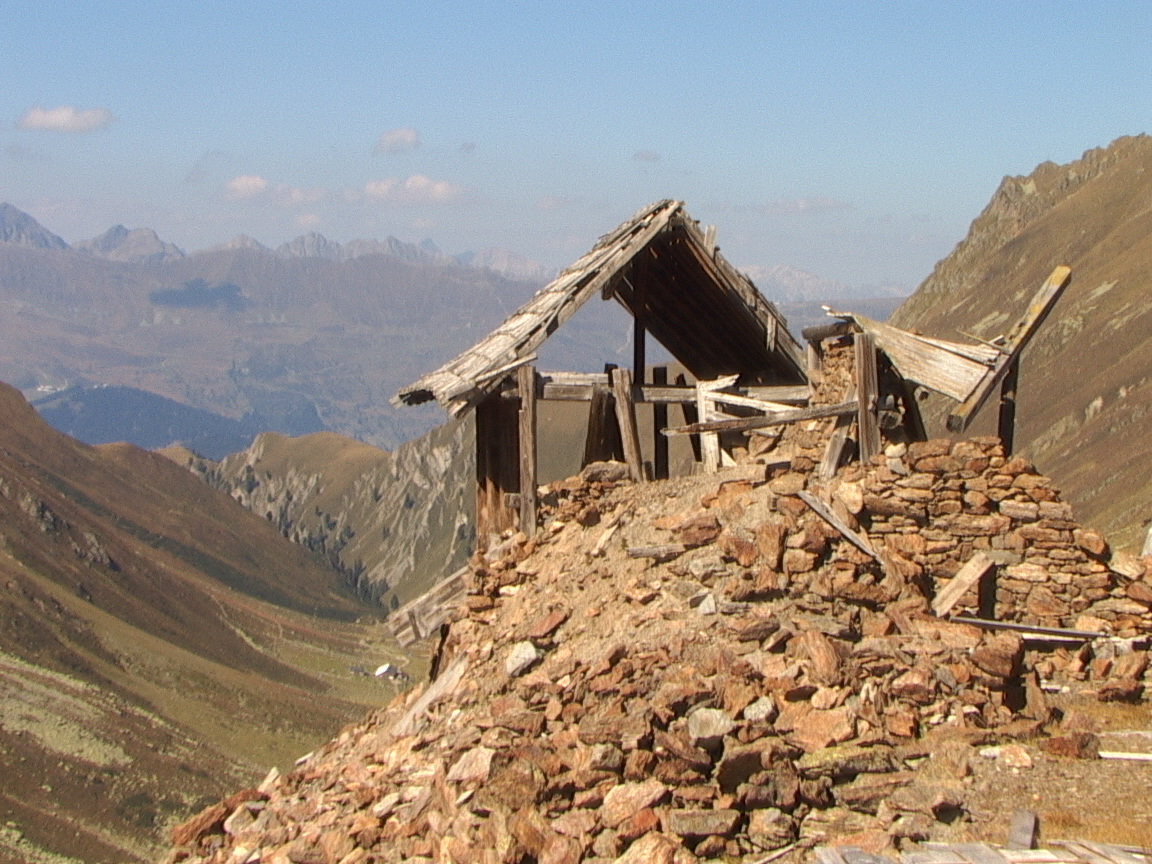 Das Bild zeigt die stark verfallene Liftstation des Bergwerkes im Platzertal, Gemeinde Tösens.